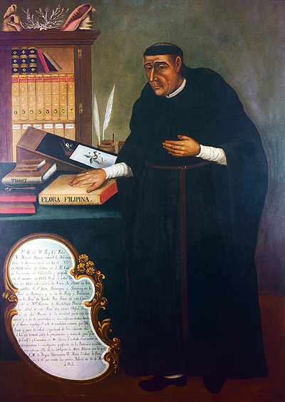 Франциско Мануель Бланко